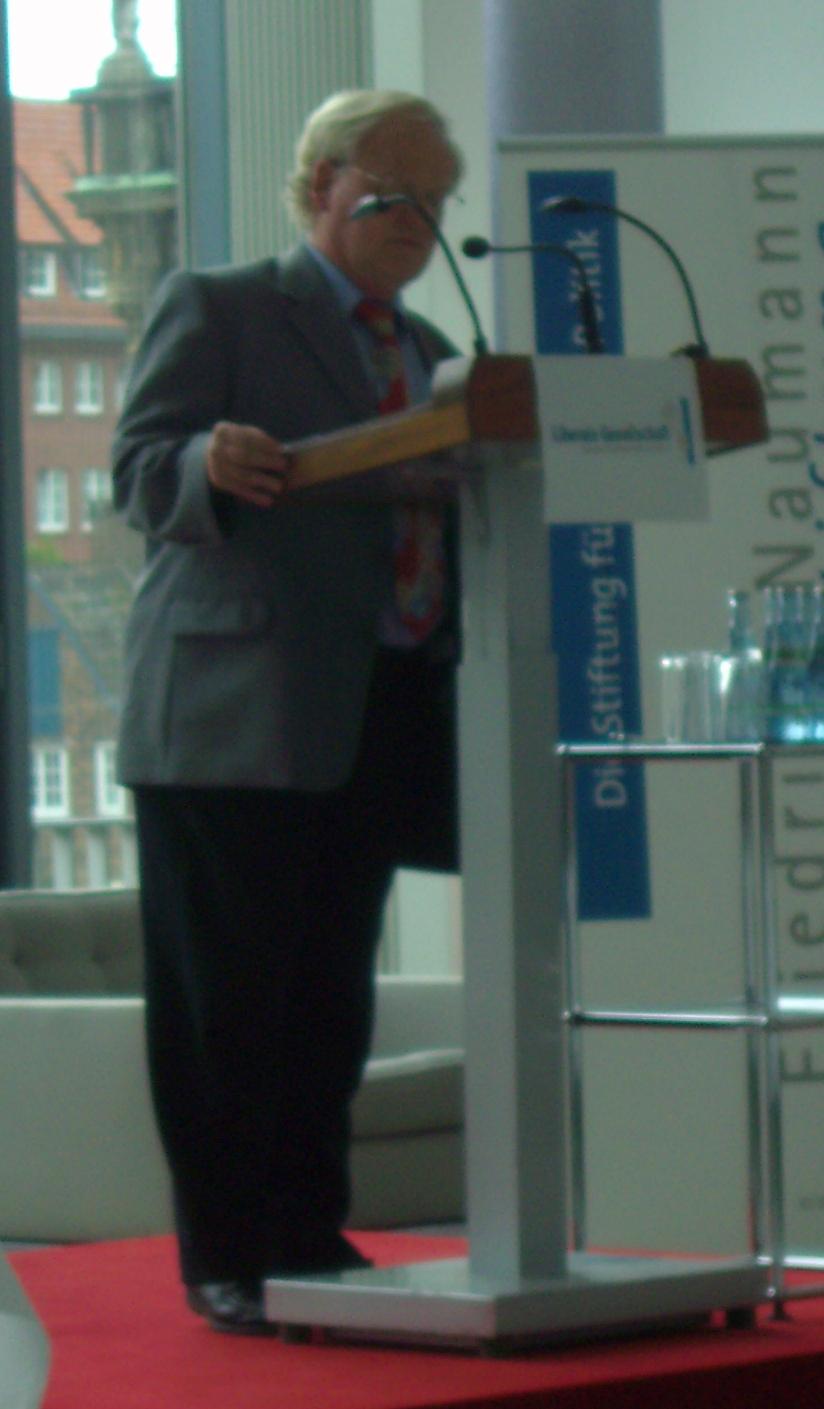 Hans Kloft bei einer Veranstaltung der Friedrich-Naumann-Stiftung in der Bremischen Bürgerschaft